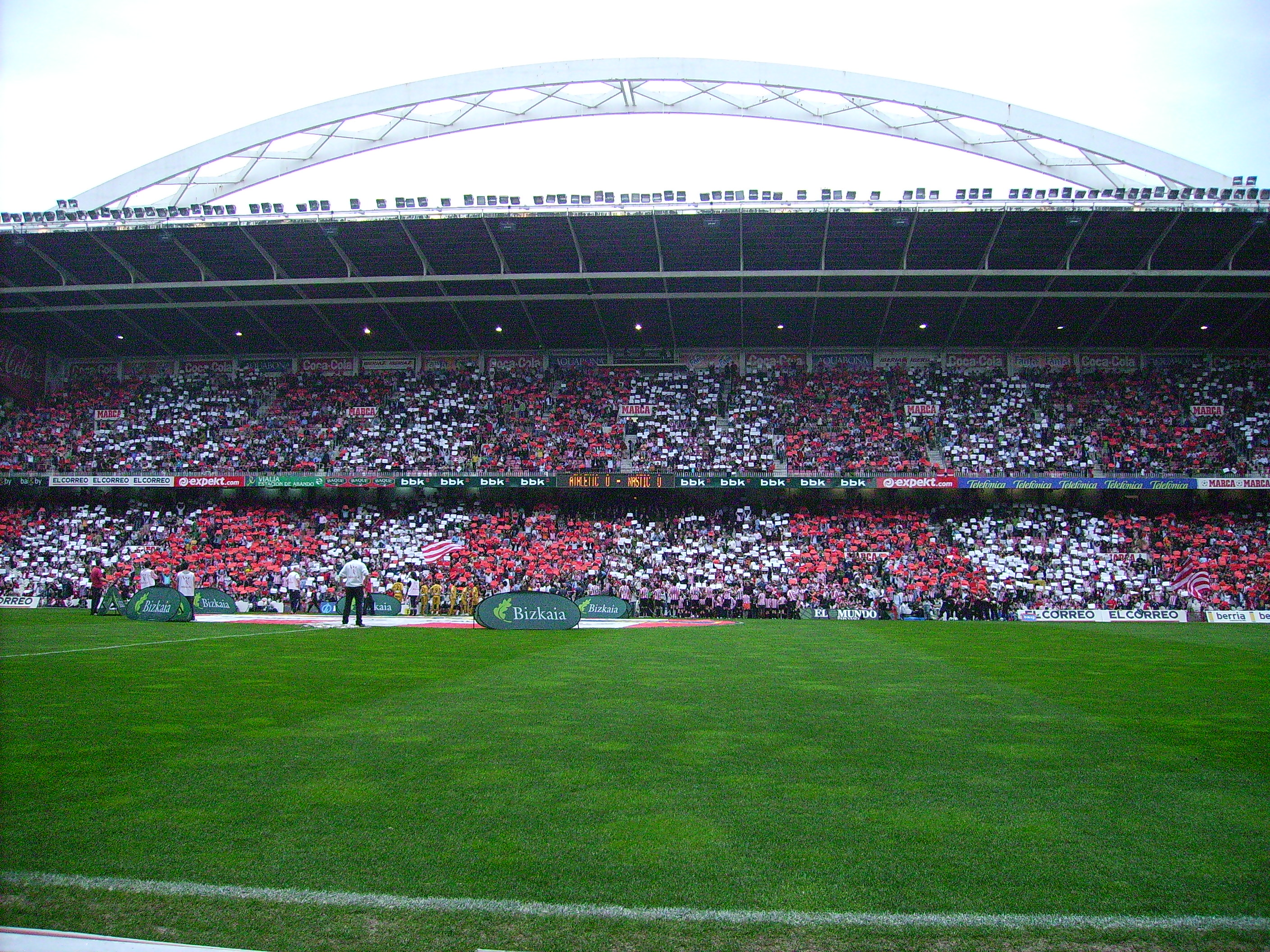 Mosaic before a match in San Mamés Stadium (Bilbao)